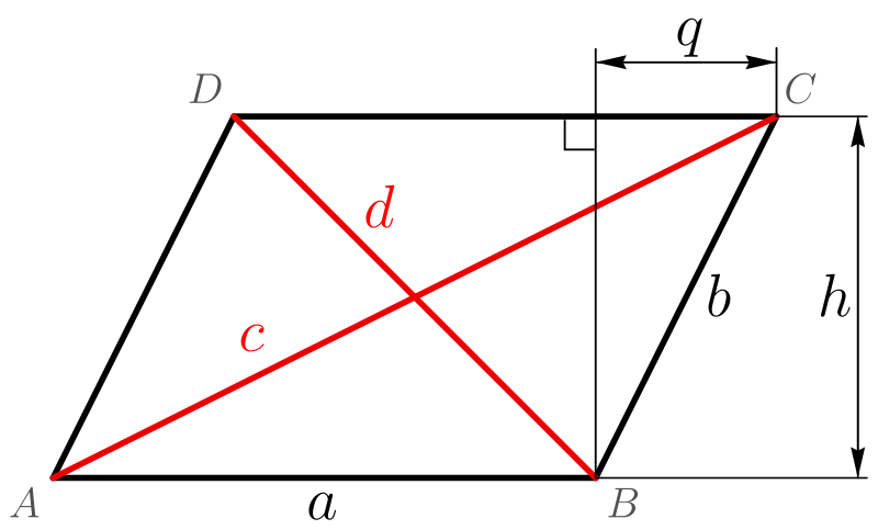 parallellogramlagen